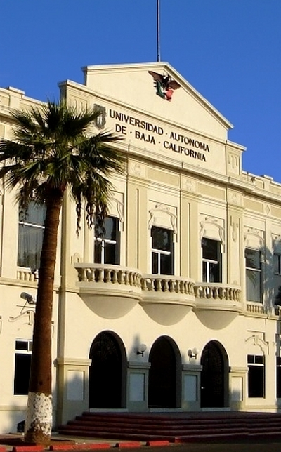 Rectoria UABC